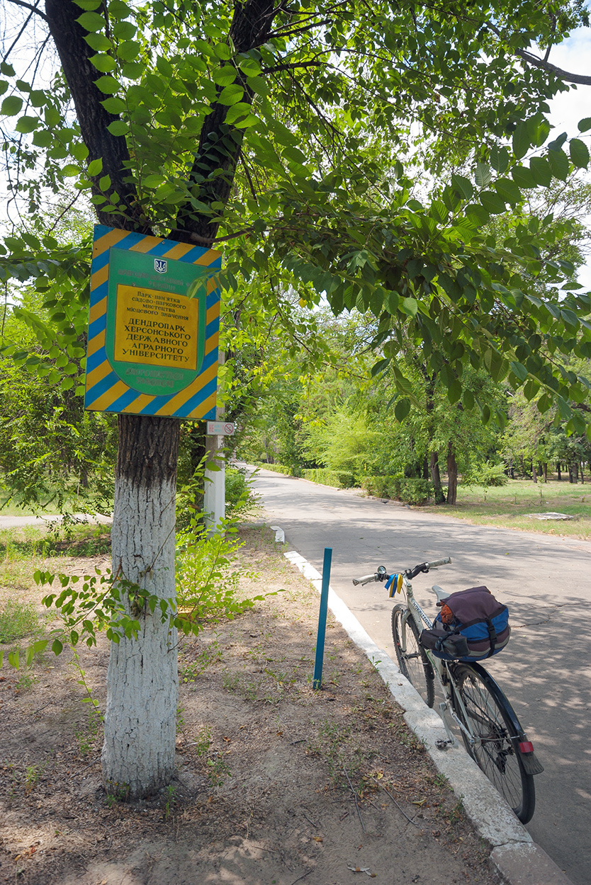 Дендропарк Херсонського державного аграрного університету, м. Херсон, вул. Р.Люксембург, 23